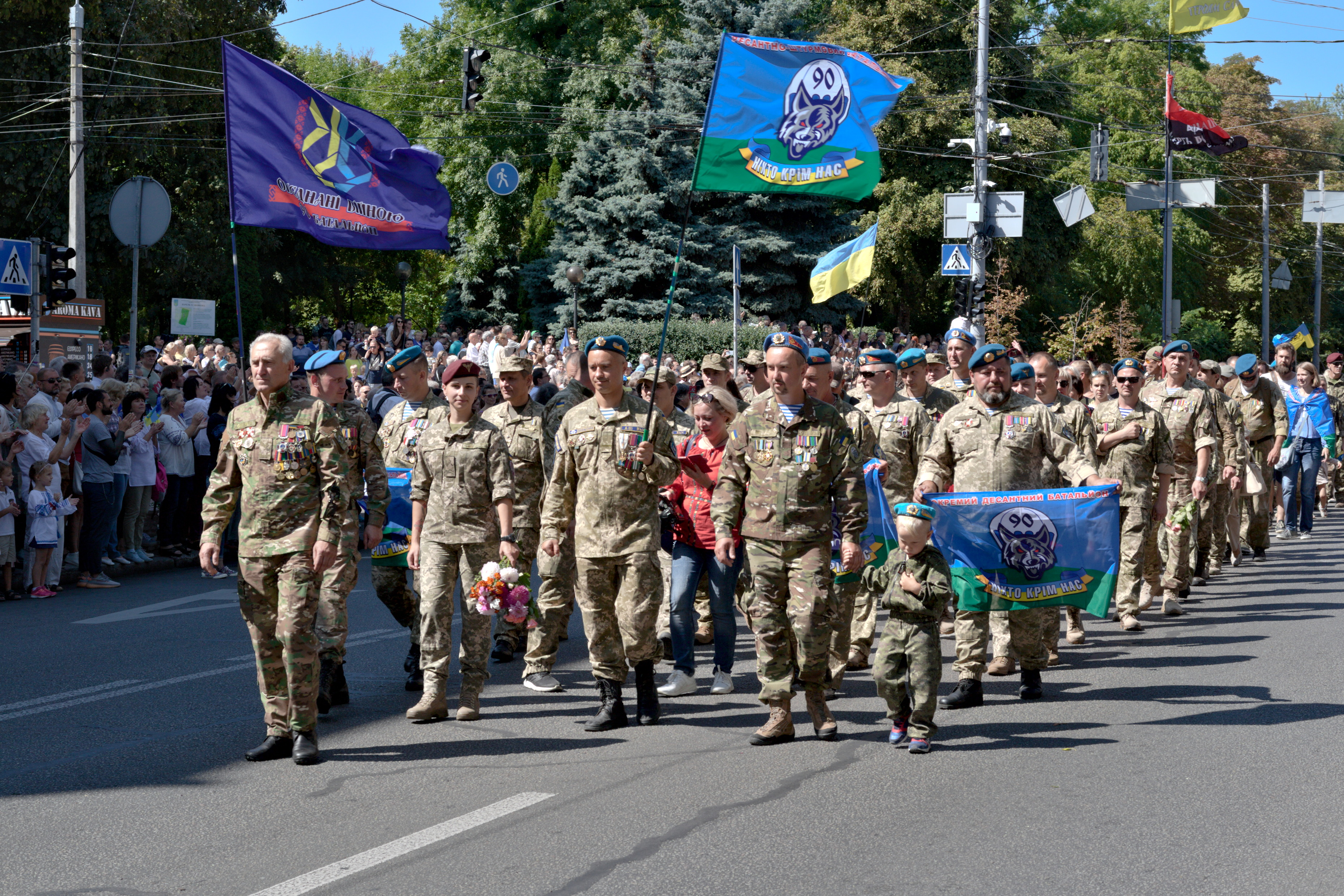 Ветерани війни на сході України з 90-го окремого аеромобільного батальйону.